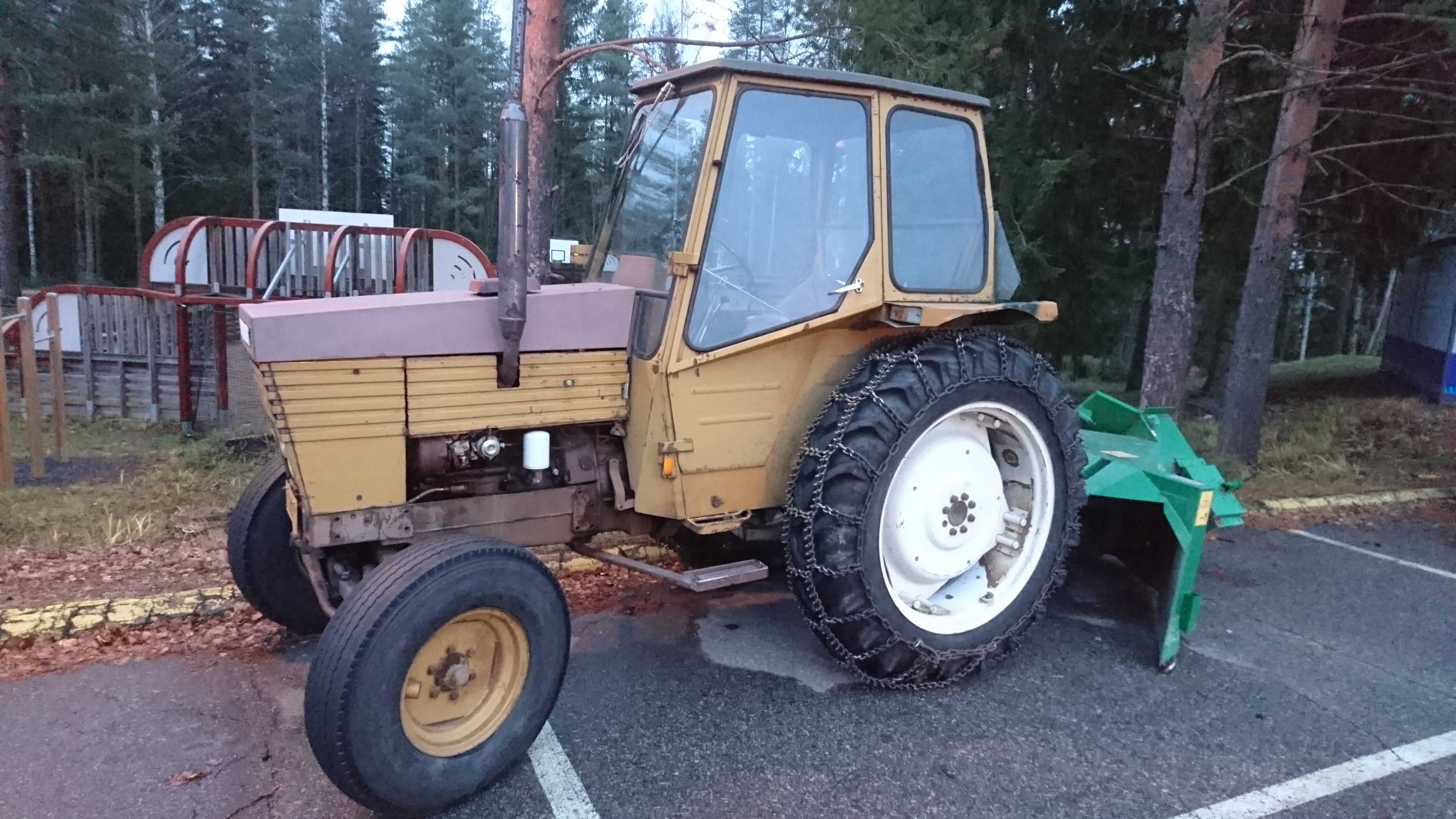 Valmet 502